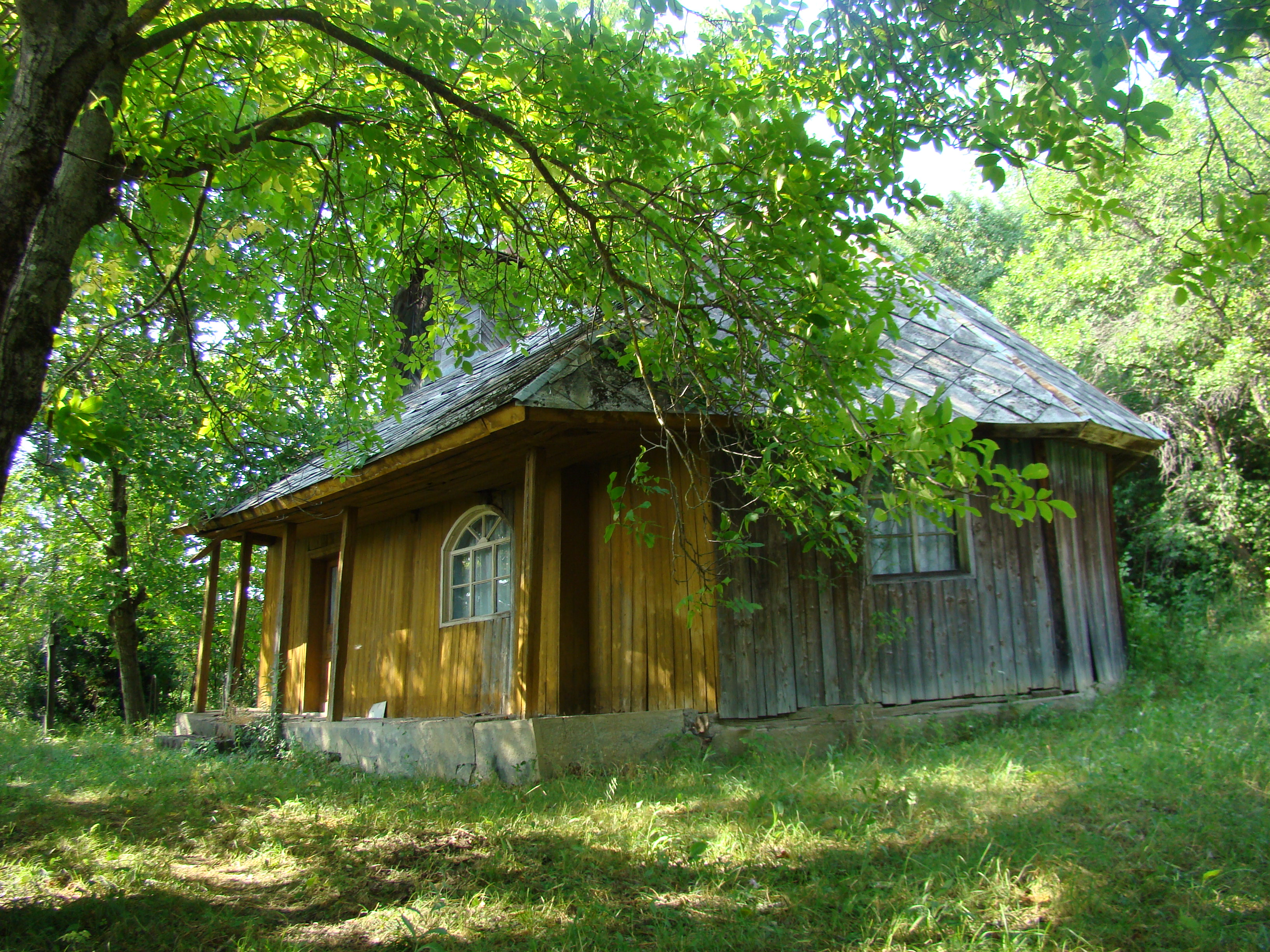 Biserica de lemn "Sf. Ioan Botezătorul" , sat COMLOD; comuna MILAŞ